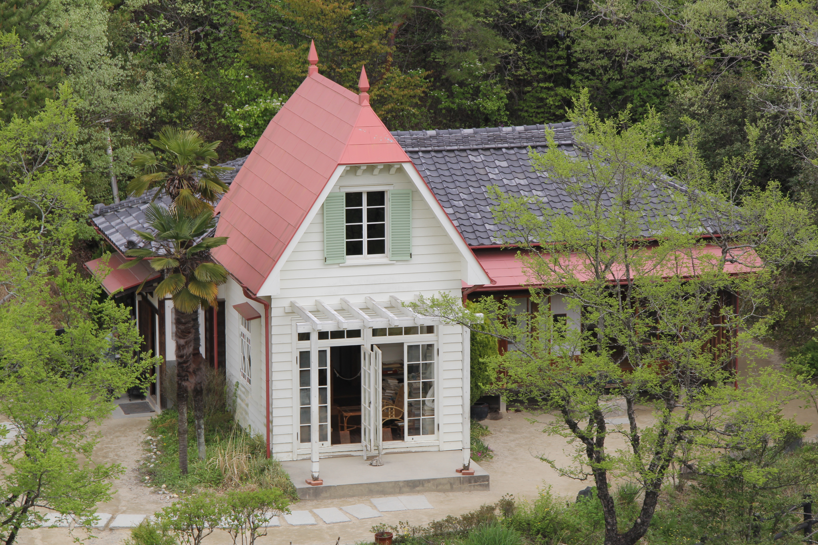 Mei and Satsuki's house